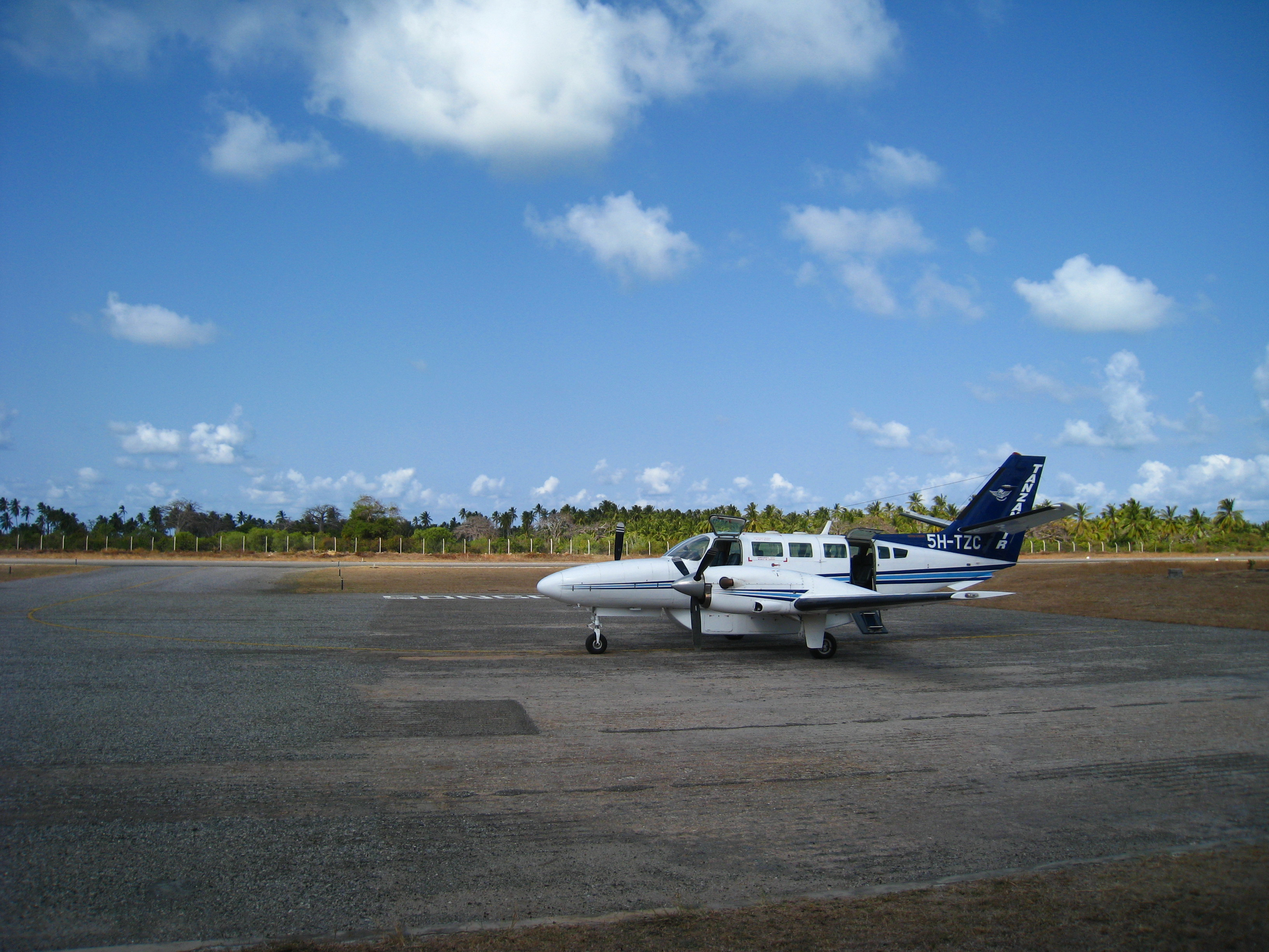 Songo Songo Airstrip